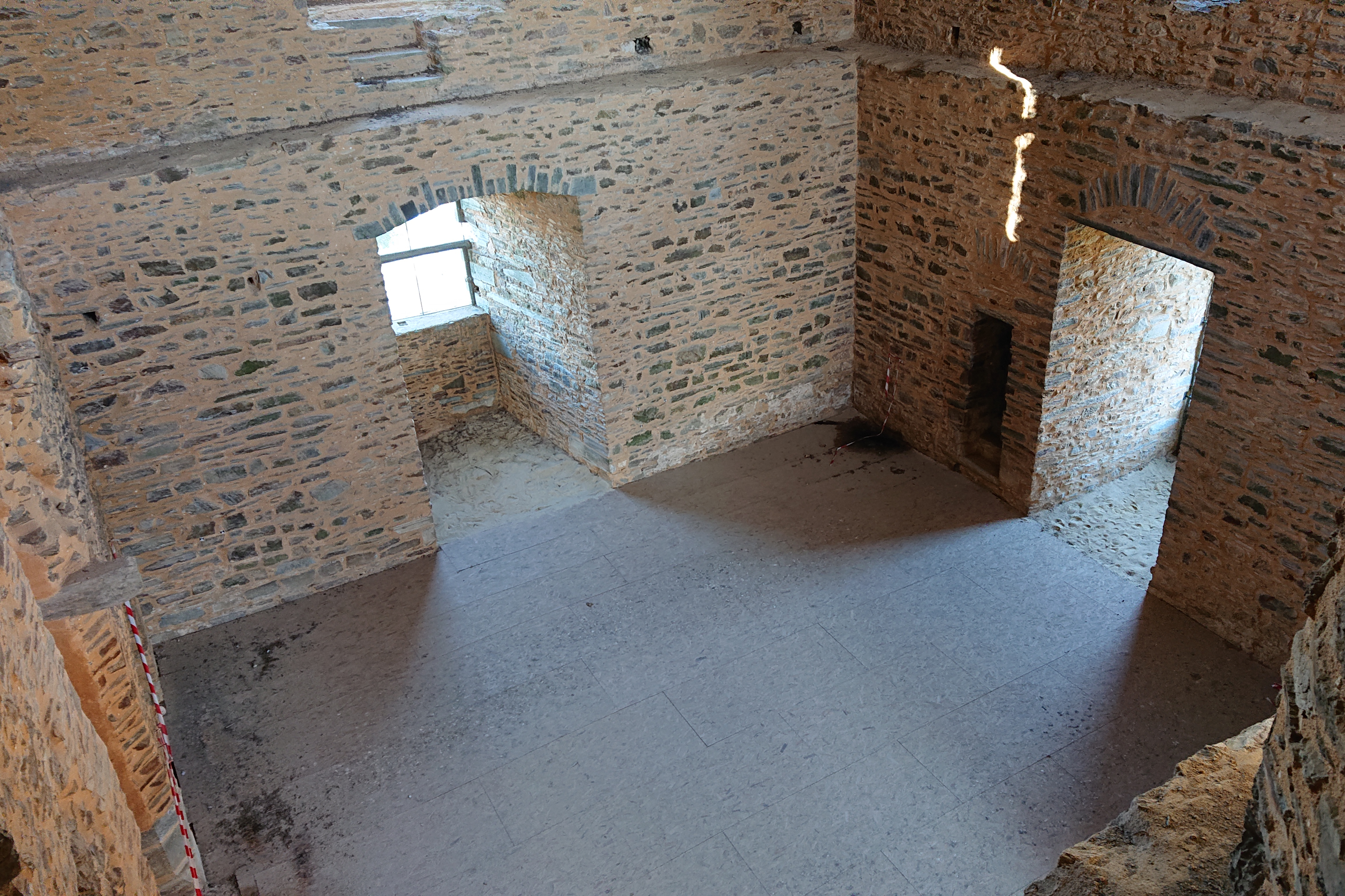 Rez-de-chaussée du donjon, Château de Châteaubriant, France.